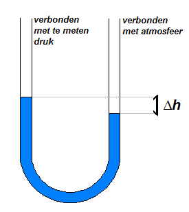 manometer zelf, autocad+paint MADe 16 aug 2005 20:37 (CEST)